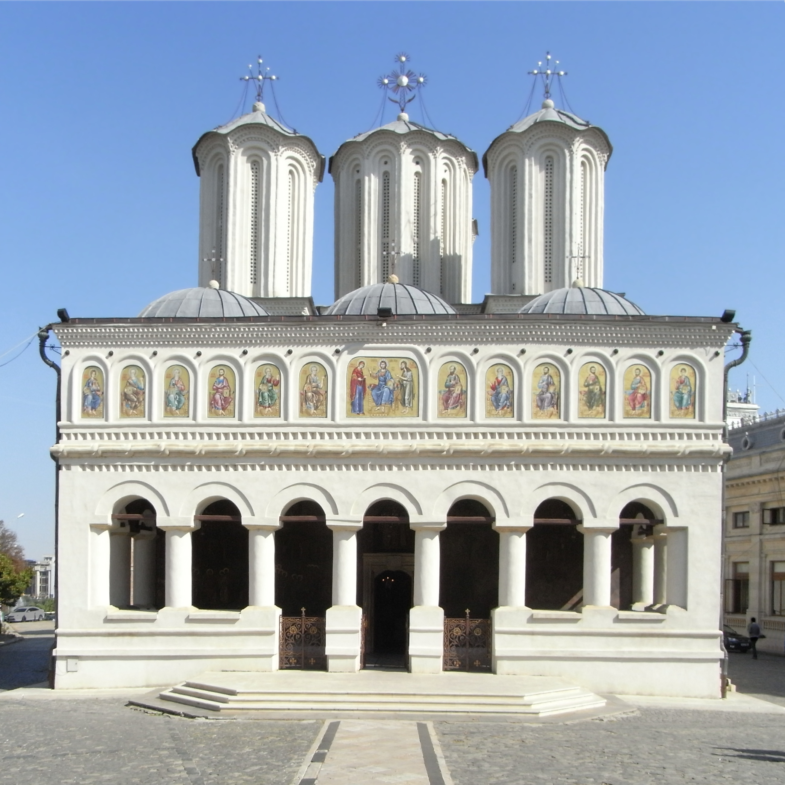 Rumänische orthodoxe Patriarchalkathedrale in Bukarest.